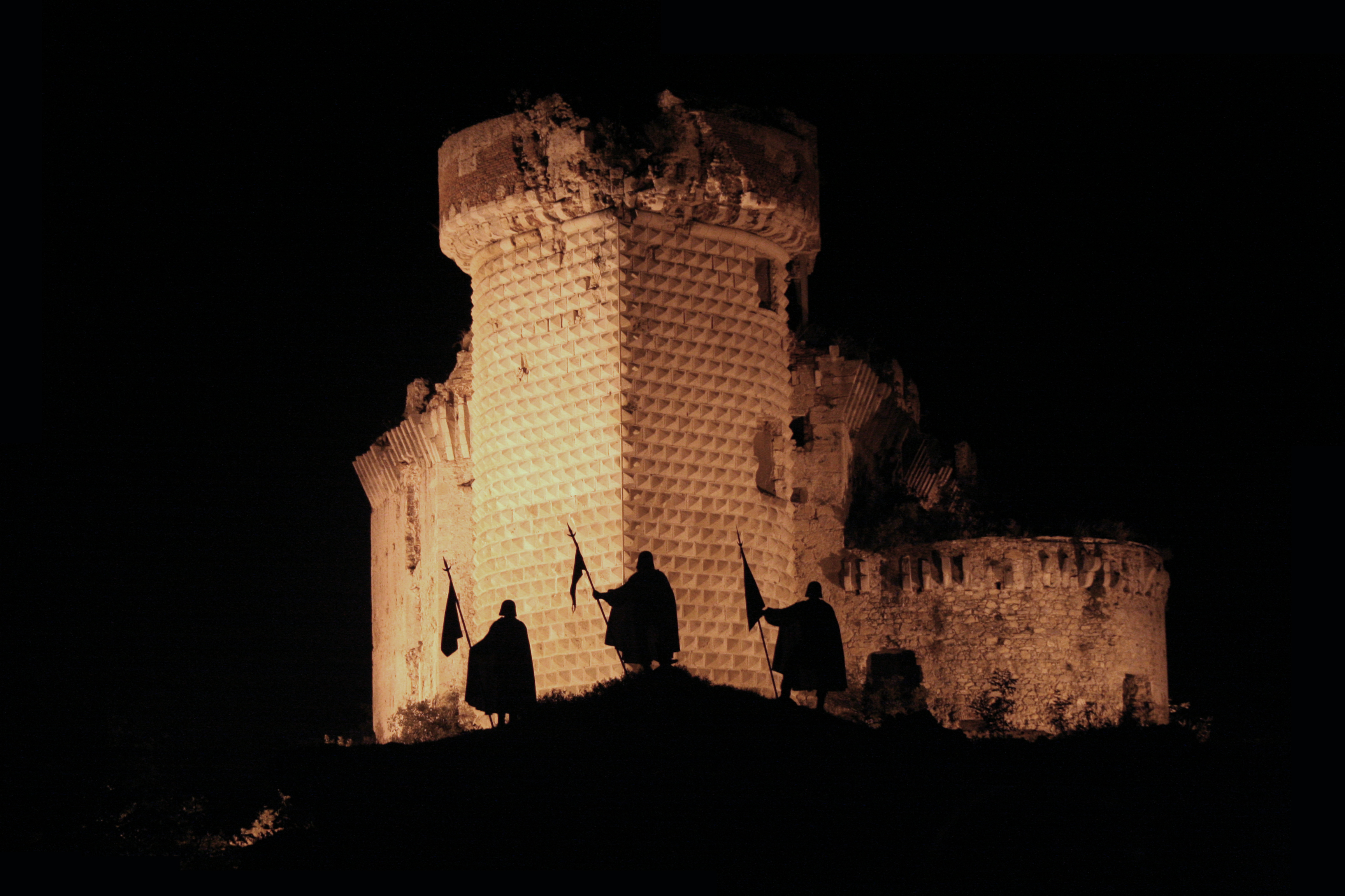 Castel Govone durante una manifestazione sui castelli di Finale Ligure (SV, ITALY). (shot by France74)